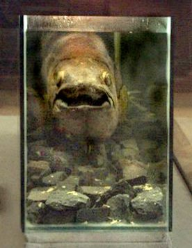 bron: wiki du; GNU FDL coelancanthen Voorkant Op verzoek van MADe lichter gemaakt. Met Wikipedia watermerk. Ed Stevenhagen Categorie:Afbeelding vis